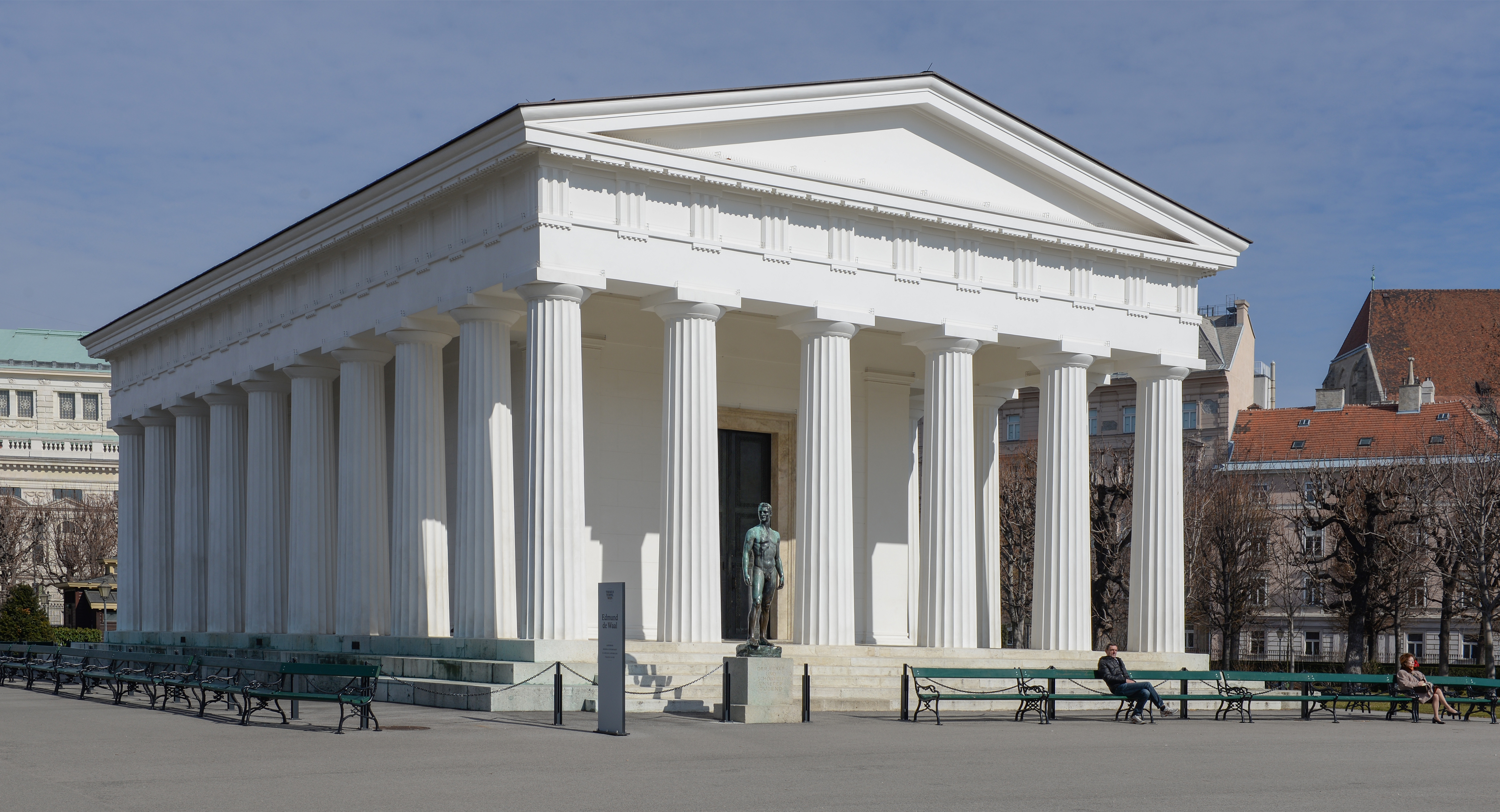 Theseustempel